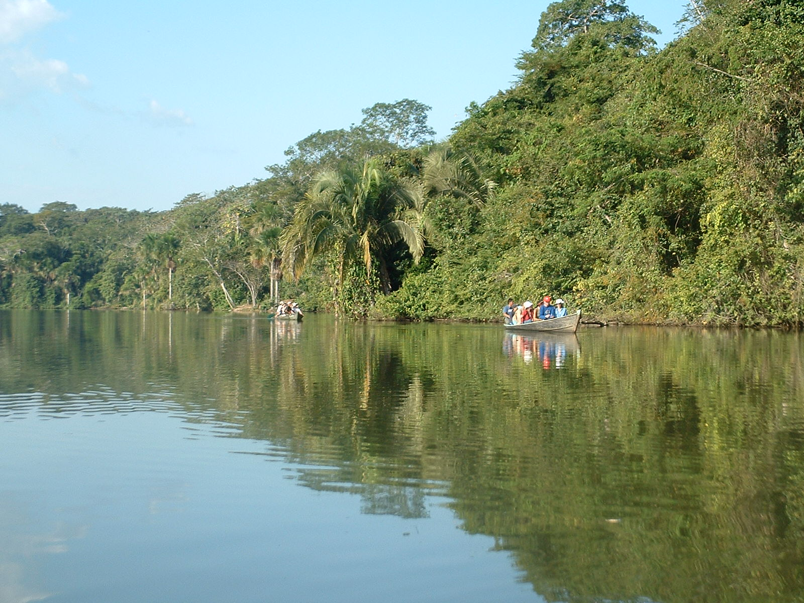 Navegando por el lago Saldoval (Amazonia, Perú).